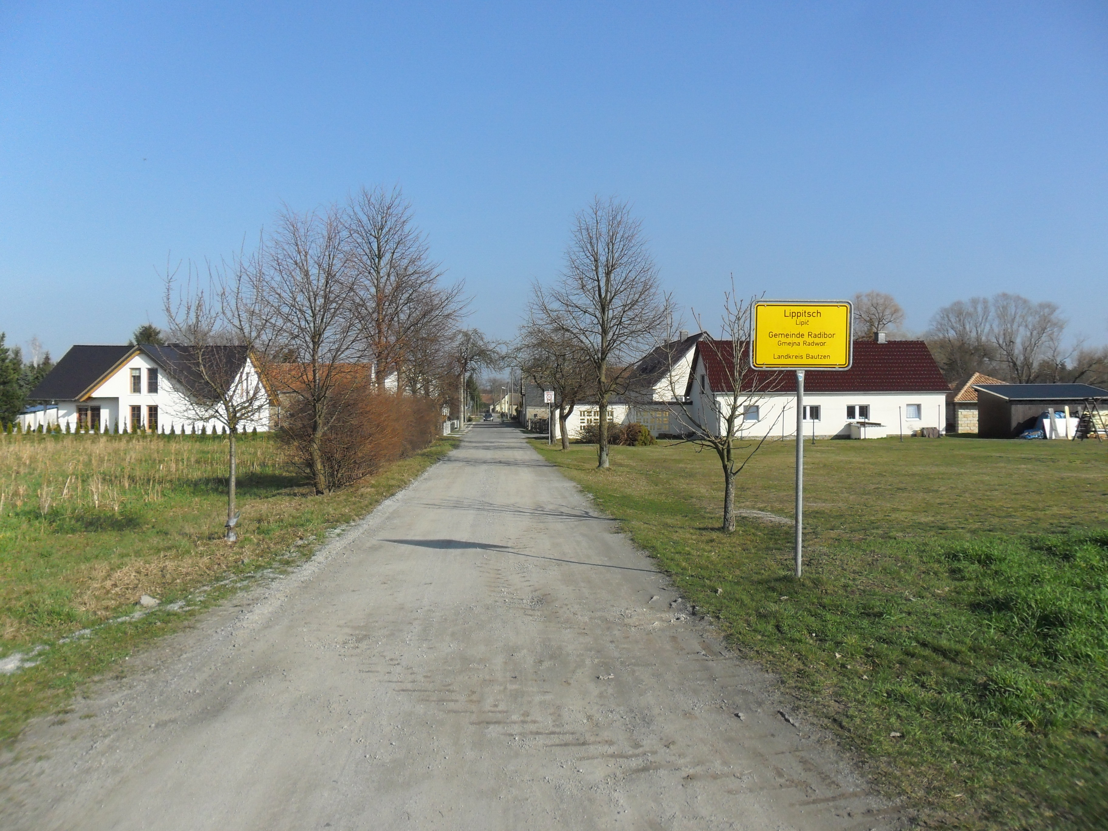 Lippitsch von westlicher Zufahrt aus betrachtet